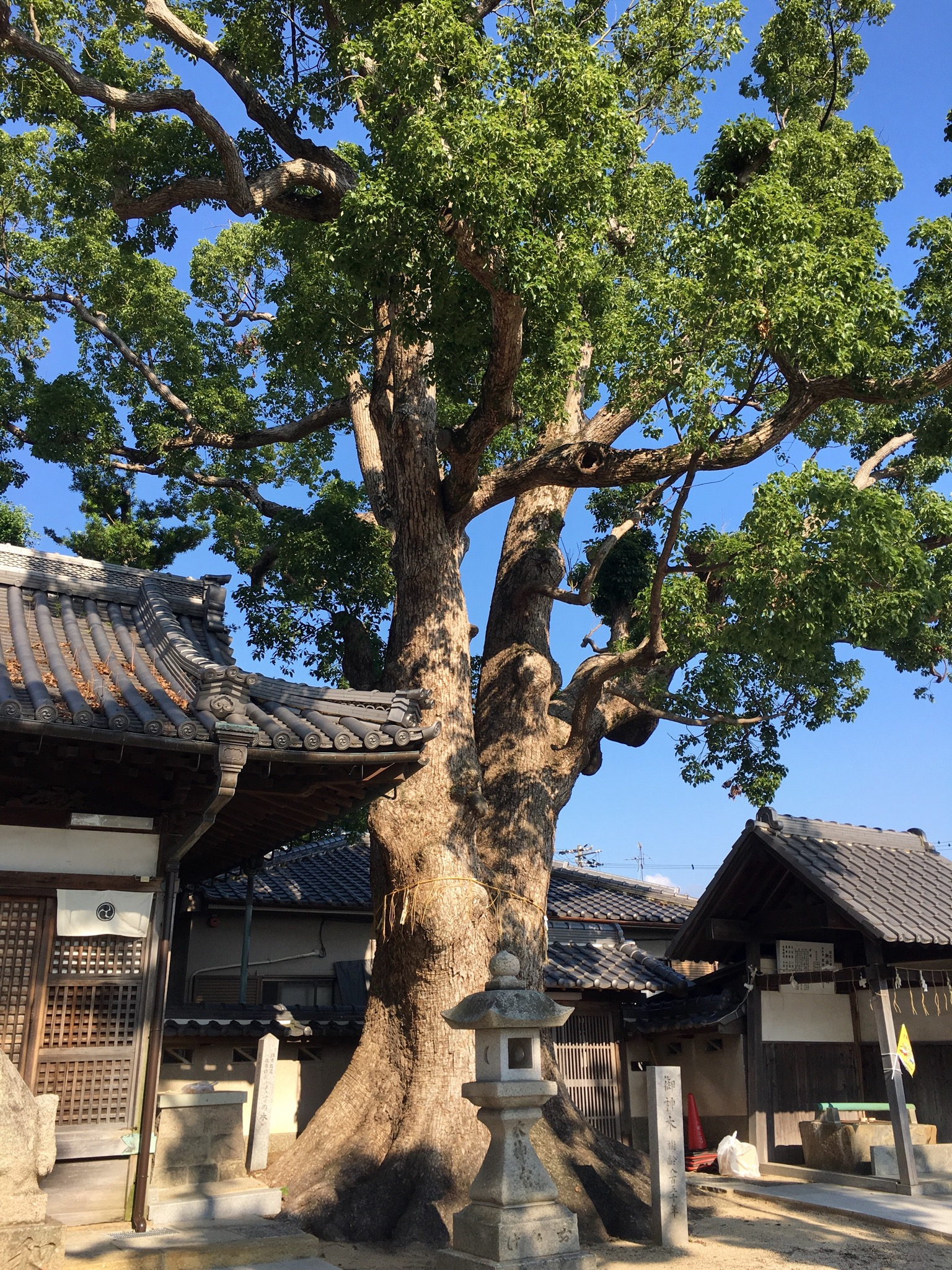 2019年7月、踞尾八幡神社で撮影。